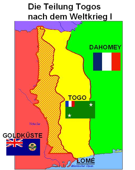 selbst erstelltes Bild des Benutzers Falk Oberdorf zur freien Verwendung